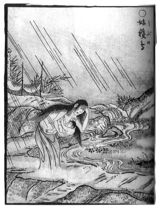 Ubume (姑獲鳥) from the Gazu Hyakki Yakō